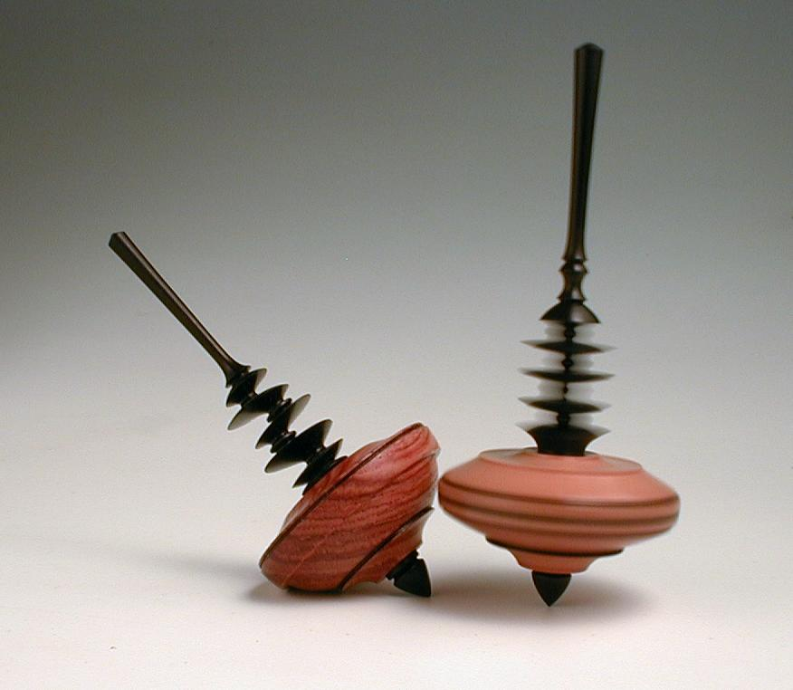 Kreisel mit exzentrischer Drehachse, gefertigt von Armin Kolb, Kunstdrechsler und Kreiselmacher